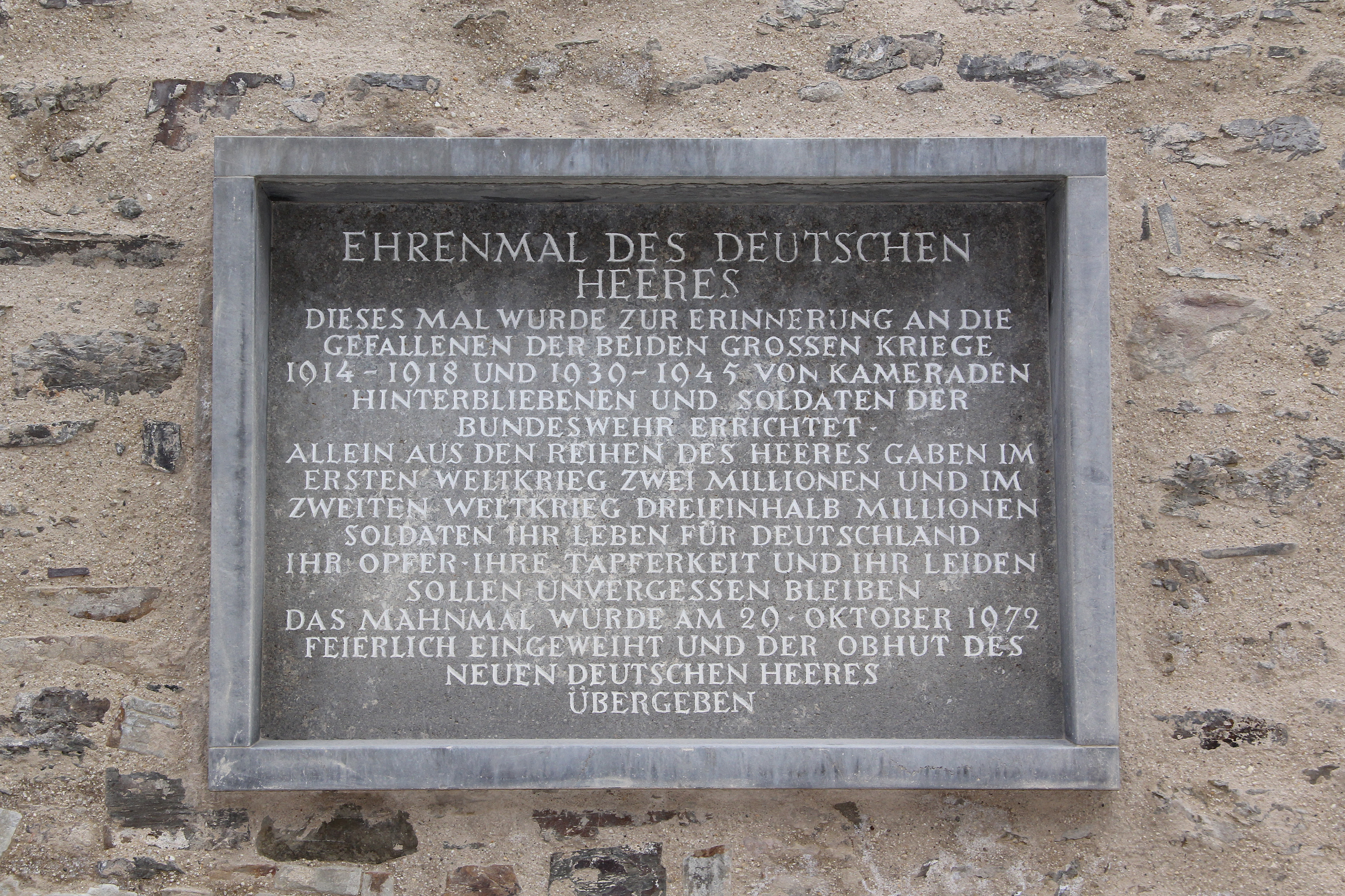 Koblenz im Buga-Jahr 2011 - Das Ehrenmal des Deutschen Heeres auf der Festung Ehrenbreitstein